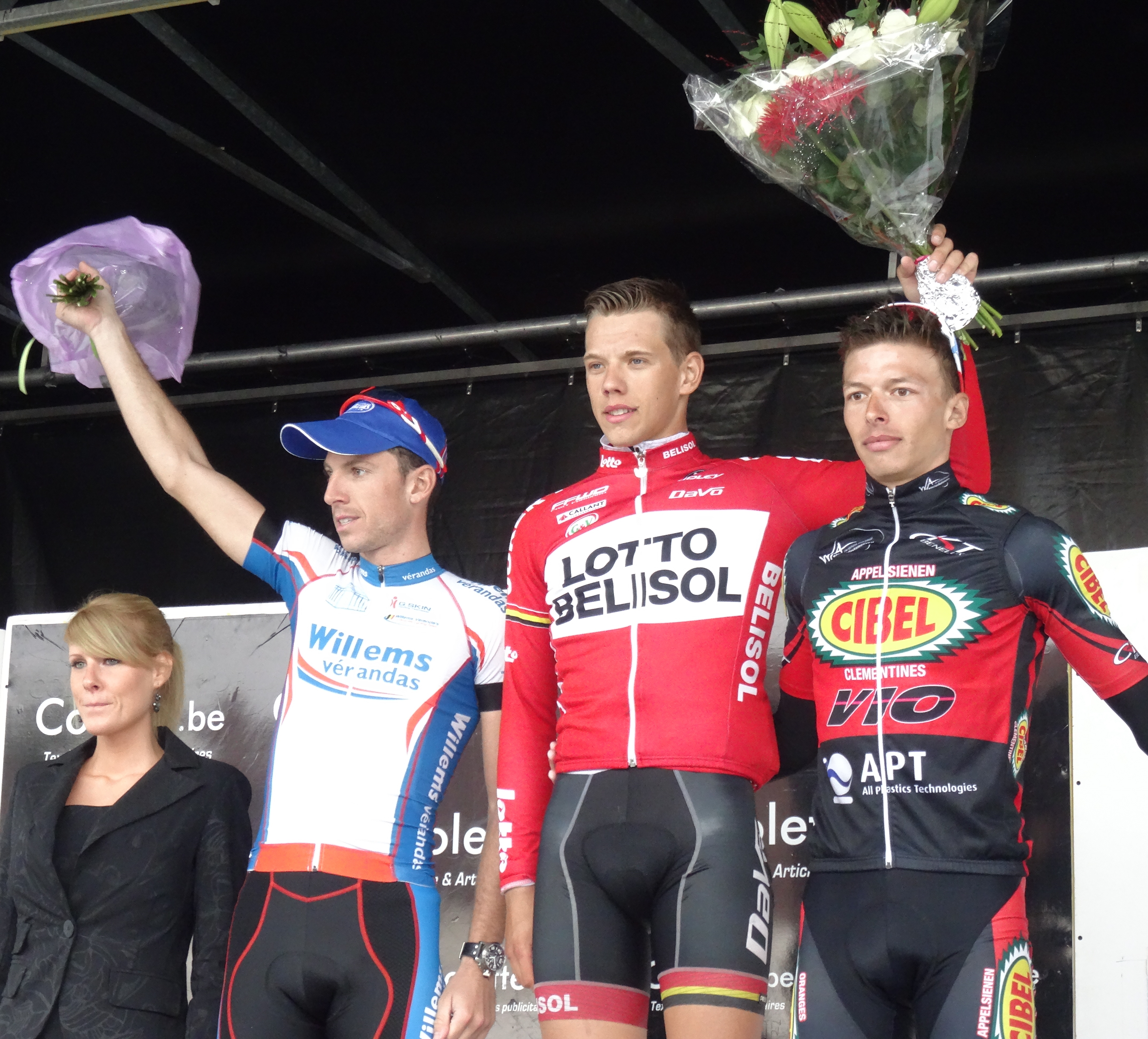 Reportage photographique réalisé le samedi 30 août à l'occasion du départ et de l'arrivée du Grand Prix des commerçants de Templeuve 2014 à Templeuve (Tournai), Belgique.